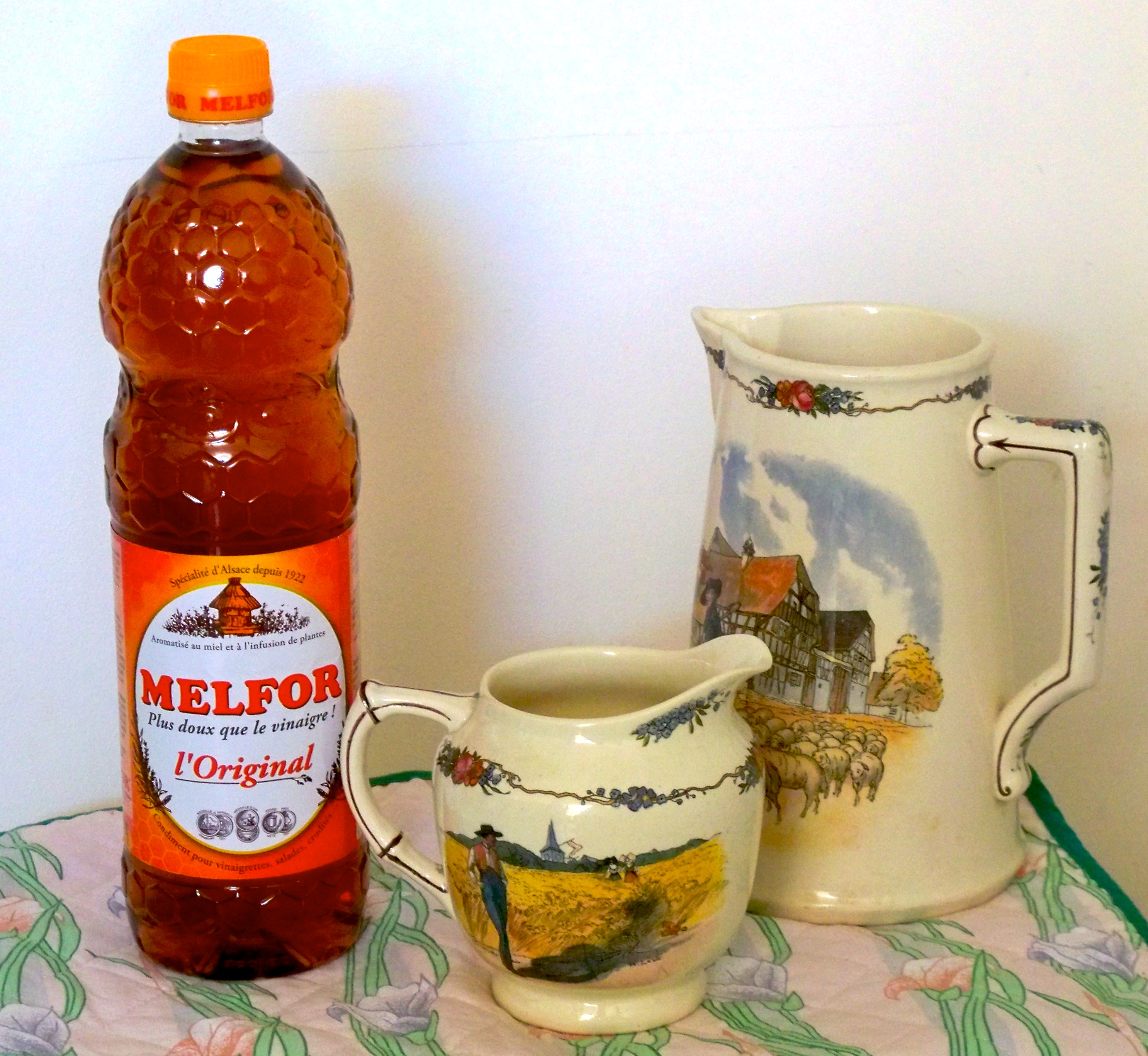 Melfor, vinaigre au miel. Spécialité alsacienne